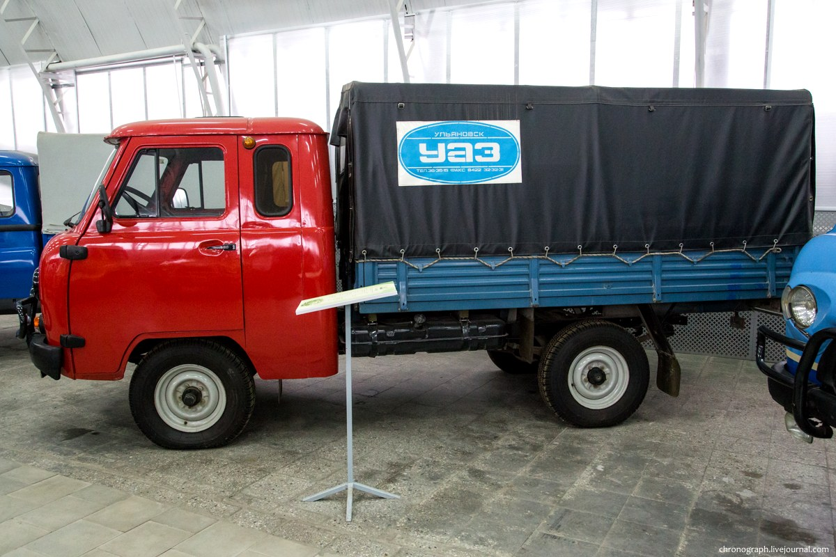 УАЗ-39095 (со спальным местом). Выставочный павильон-музей УАЗа.